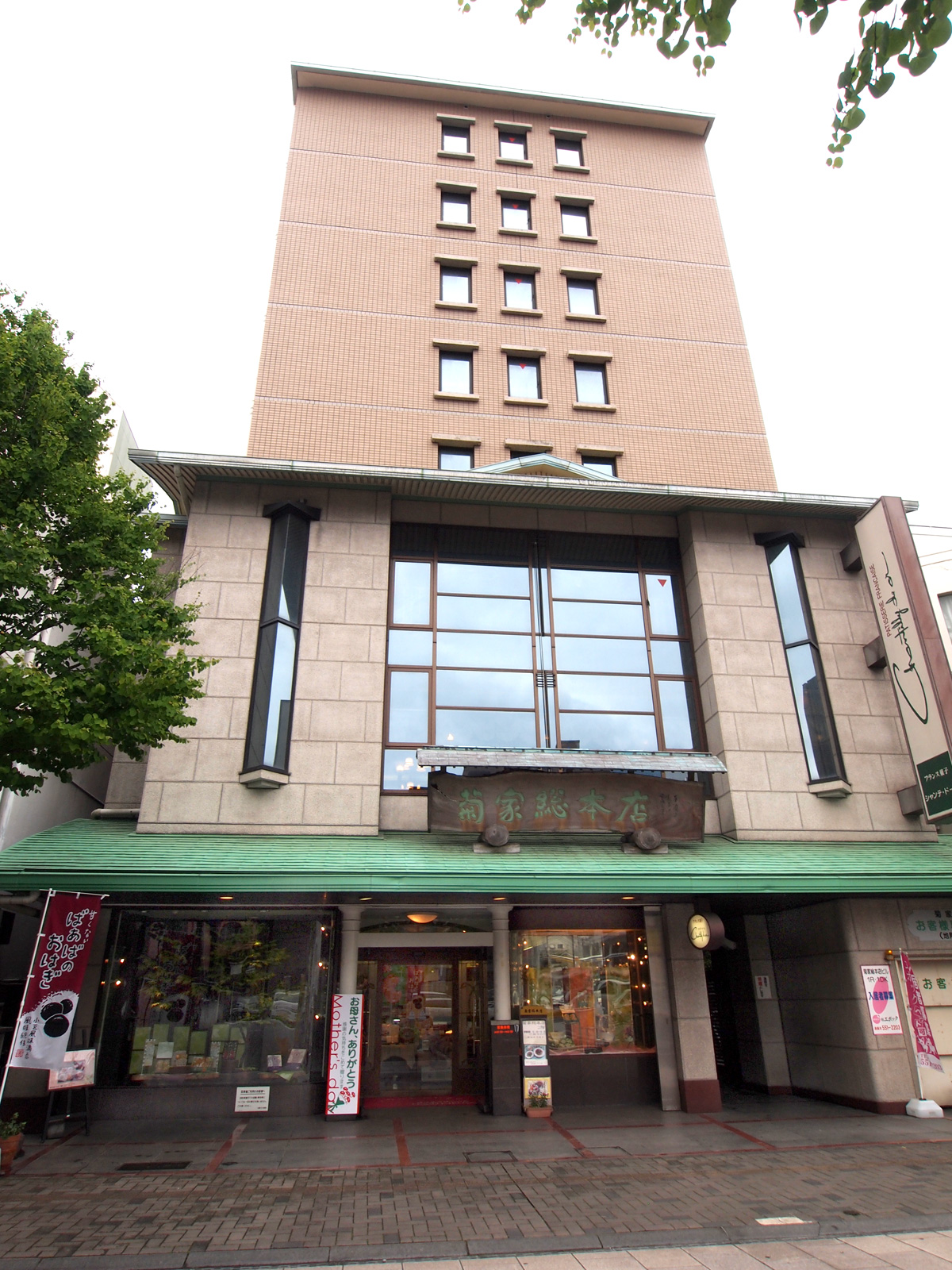 菊家総本店（大分県大分市）